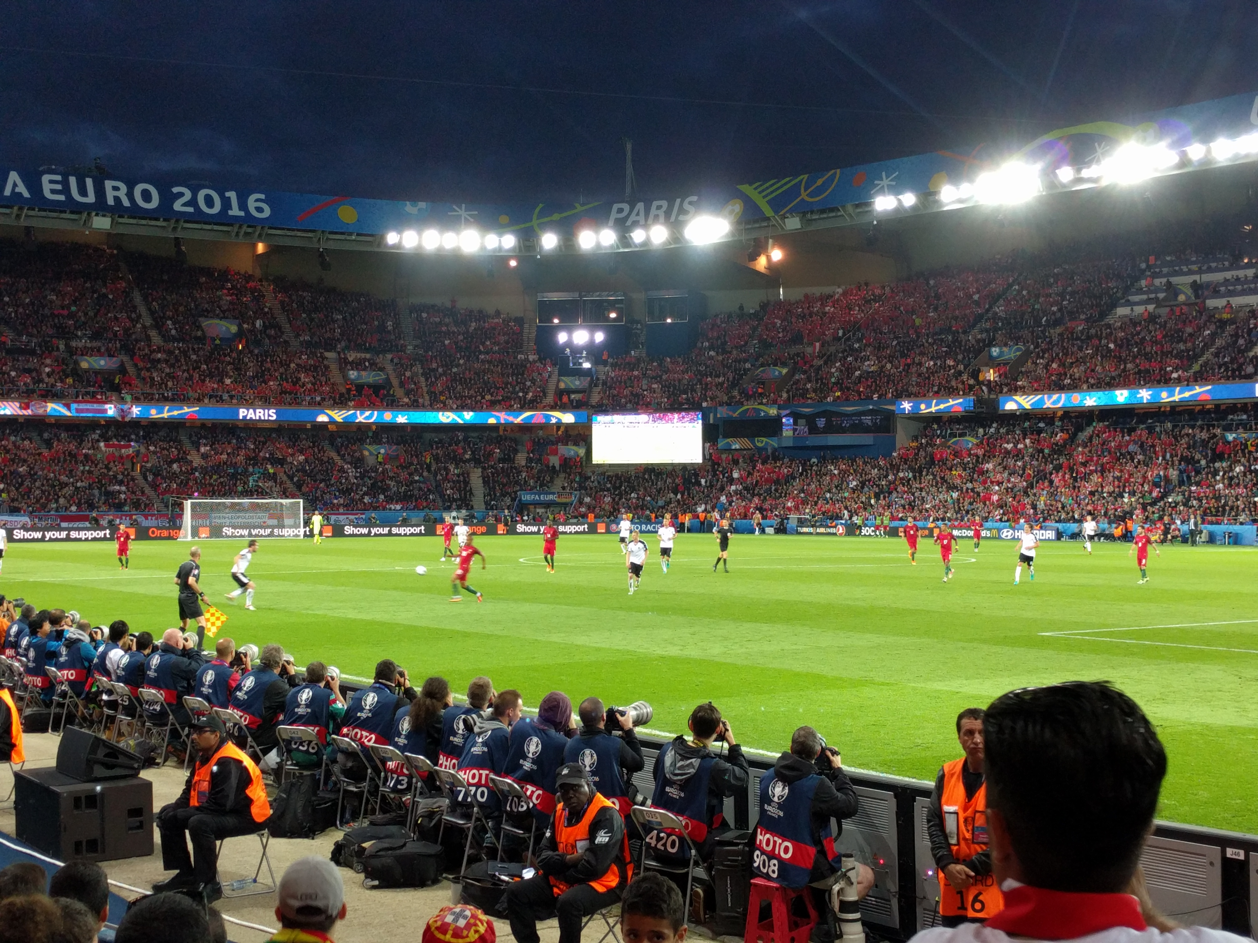 Portugal vs Austria EM2016